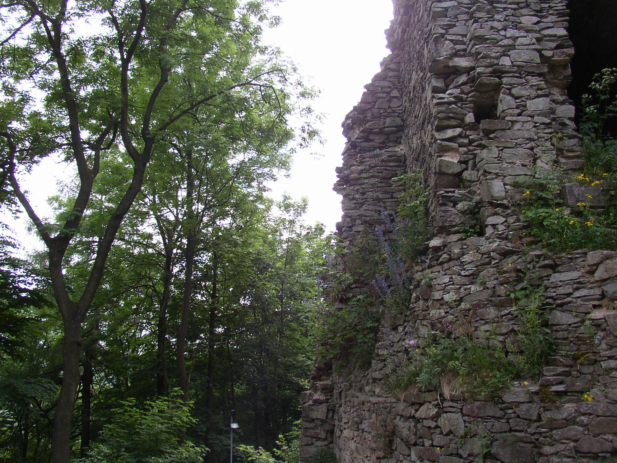 Líc zbořené brány na hradě Tolštejn